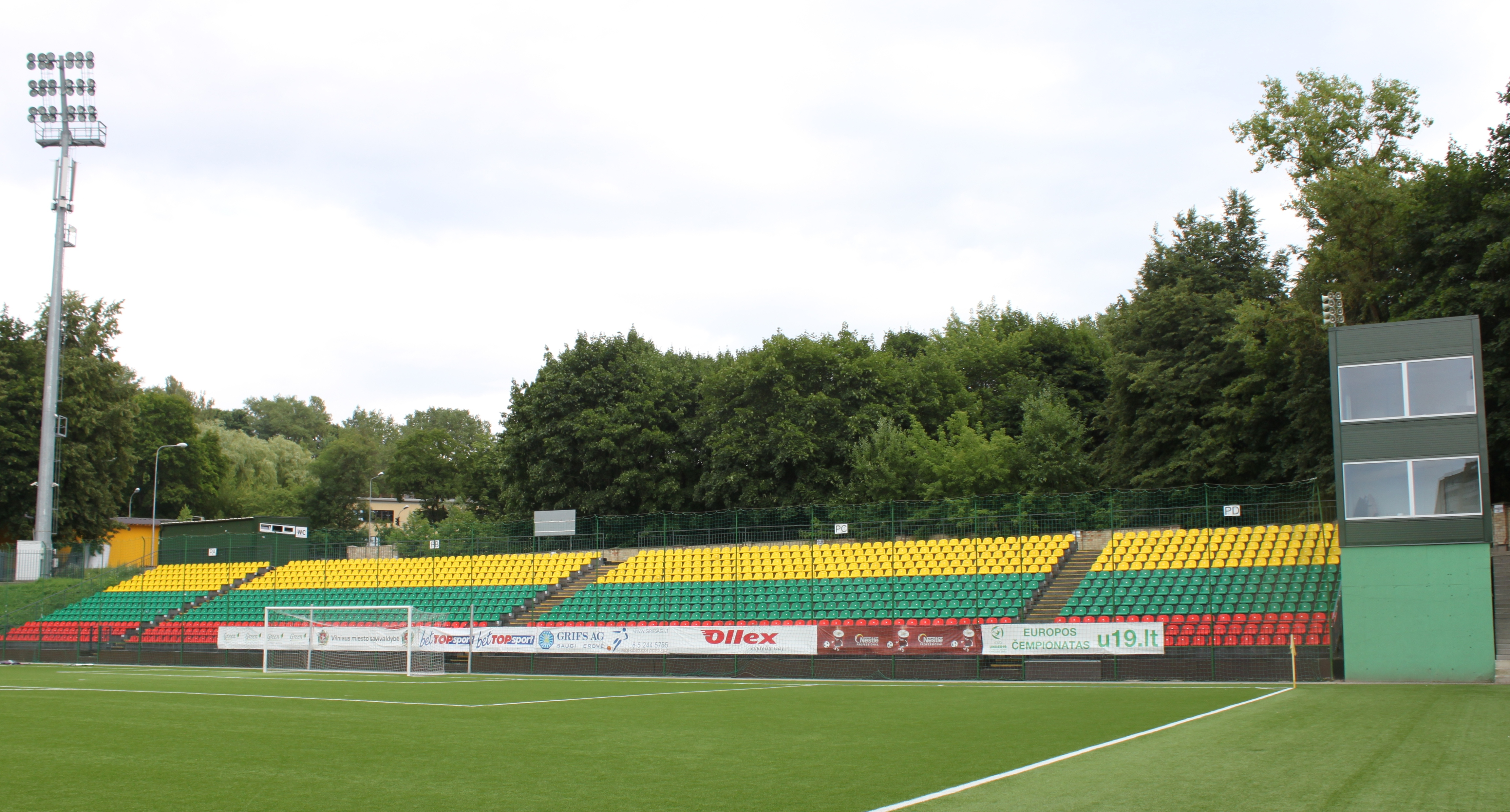 LFF stadiono pietų tribūna